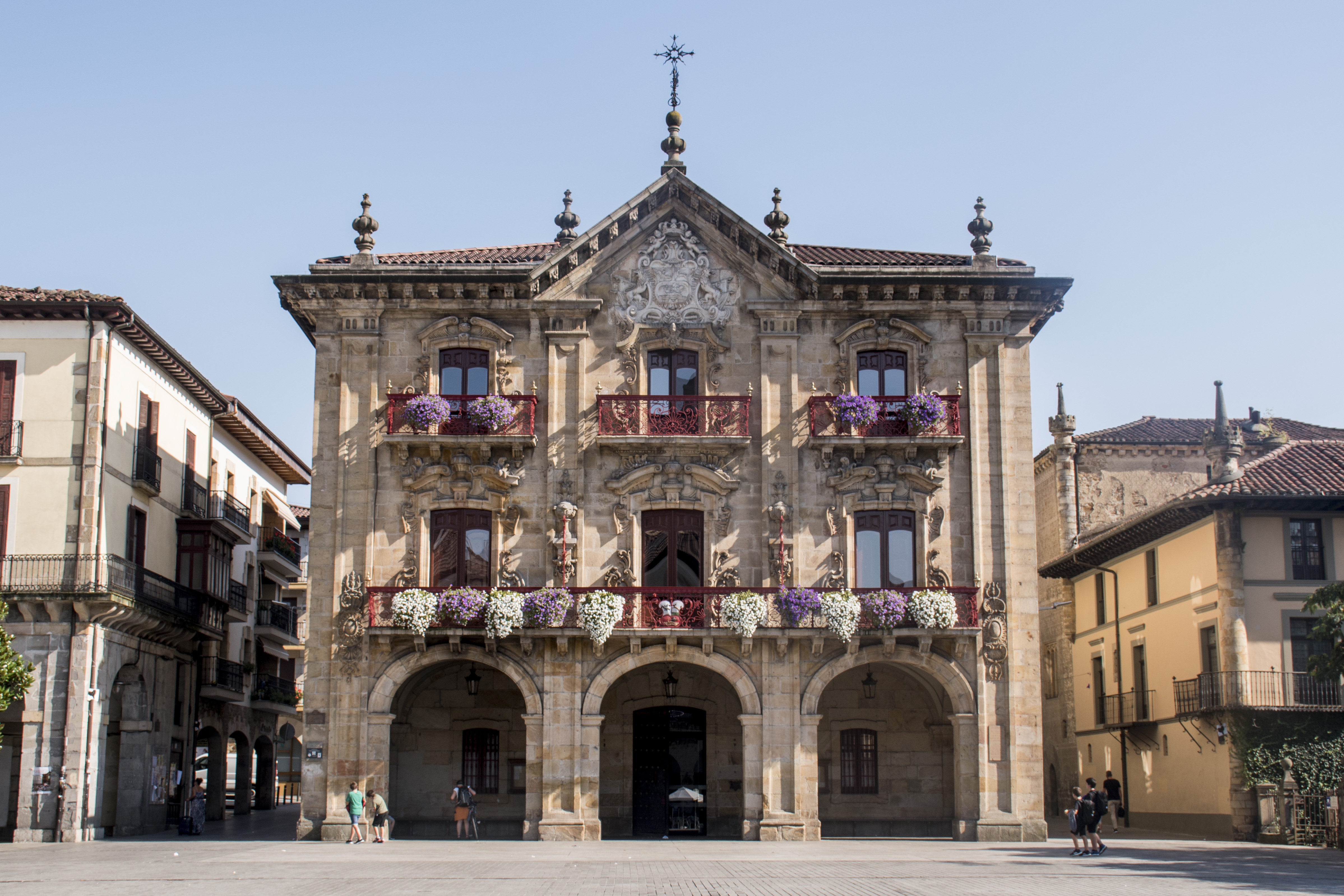 Oñatiko udaletxea